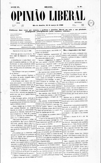 Primeira página do jornal Opinião Liberal (nº 21 de 13 de março de 1869) com a lista de reformas propostas pelos radicais.